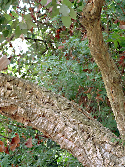 Una sughera nella riserva Feniglia Foto di berlinerBlues 14:56, 27 ago 2006 (CEST)